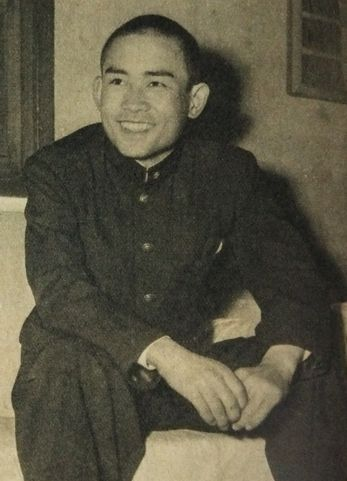 小島訓一（立教大学硬式野球部）